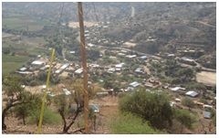 Vista General de la localidad de Vila Vila en el Municipio de Pojo, Departamento de Cochabamba